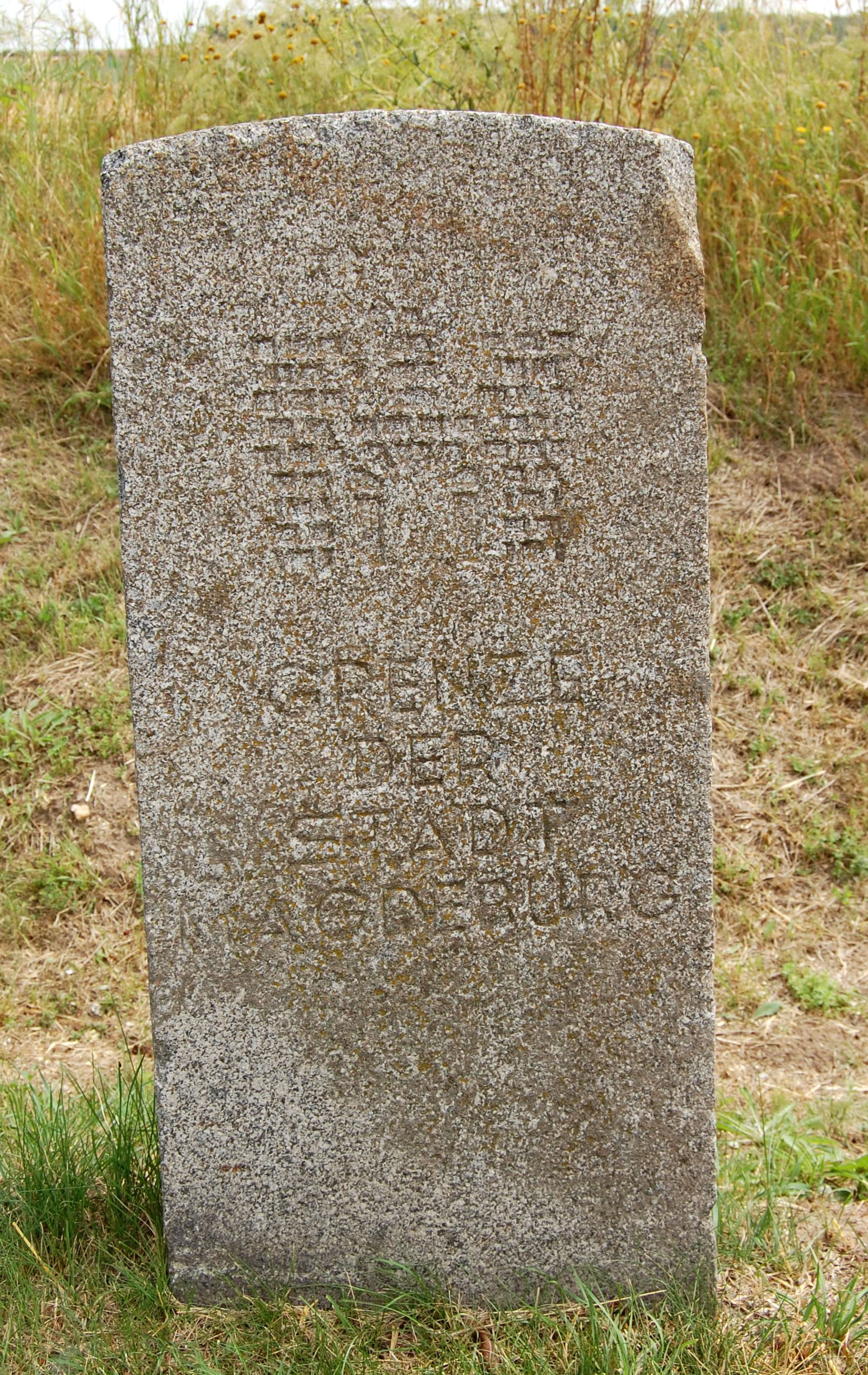 Grenzstein der Stadt Magdeburg, Südseite der Sohlener Straße kurz vor Sohlen